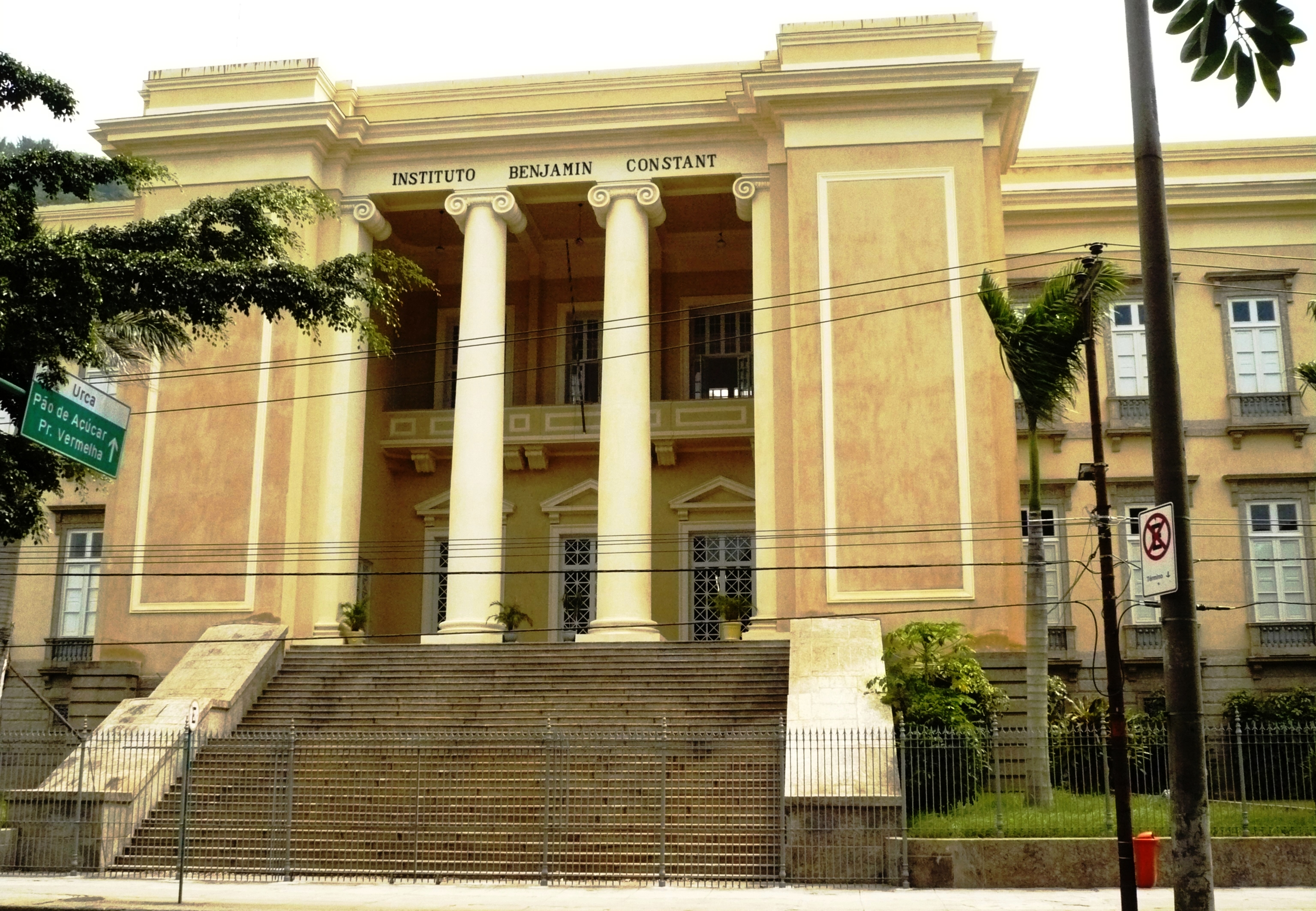 Instituto Benjamin Constant, Urca, Rio de Janeiro, RJ, Brasil: entrada.